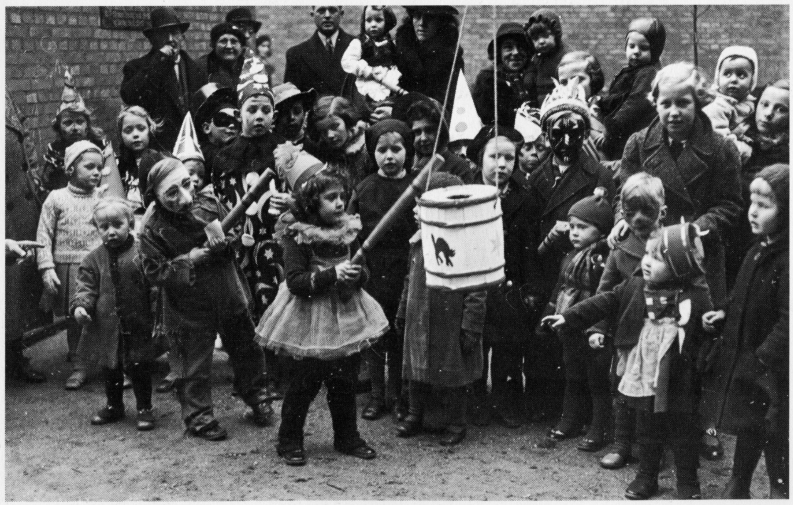 Børn og fastalavnstønde: At slå katten af tønden.